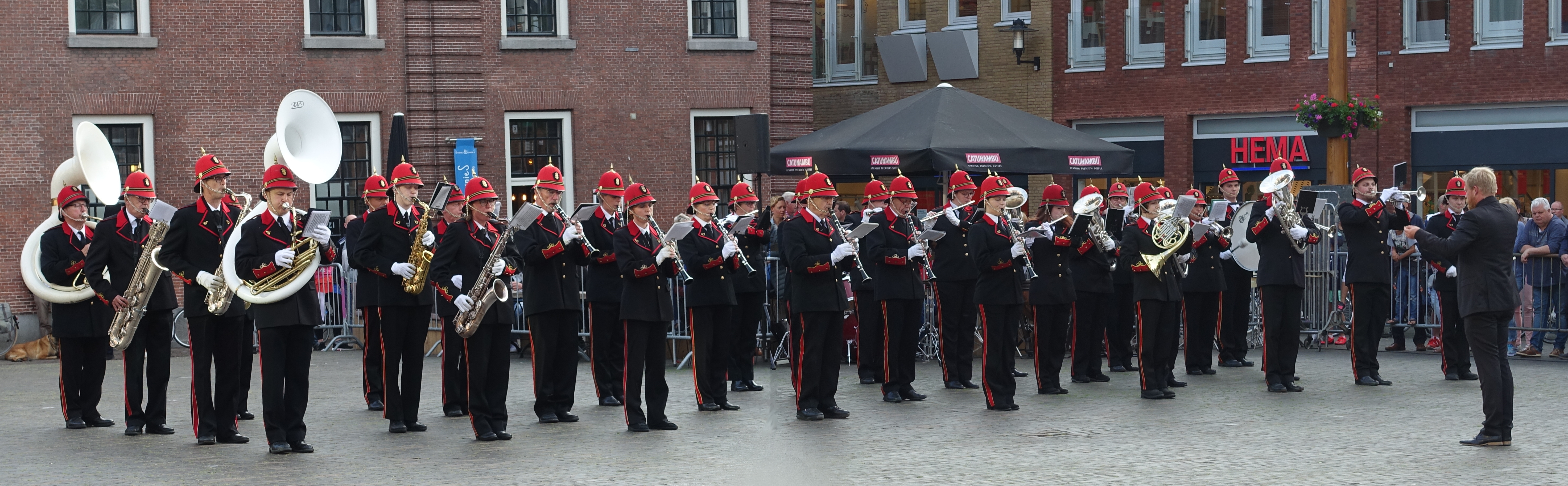 Harmonie de Vriendschap tijdens kaastaptoe 2019. Met dirigent Jan van Dam